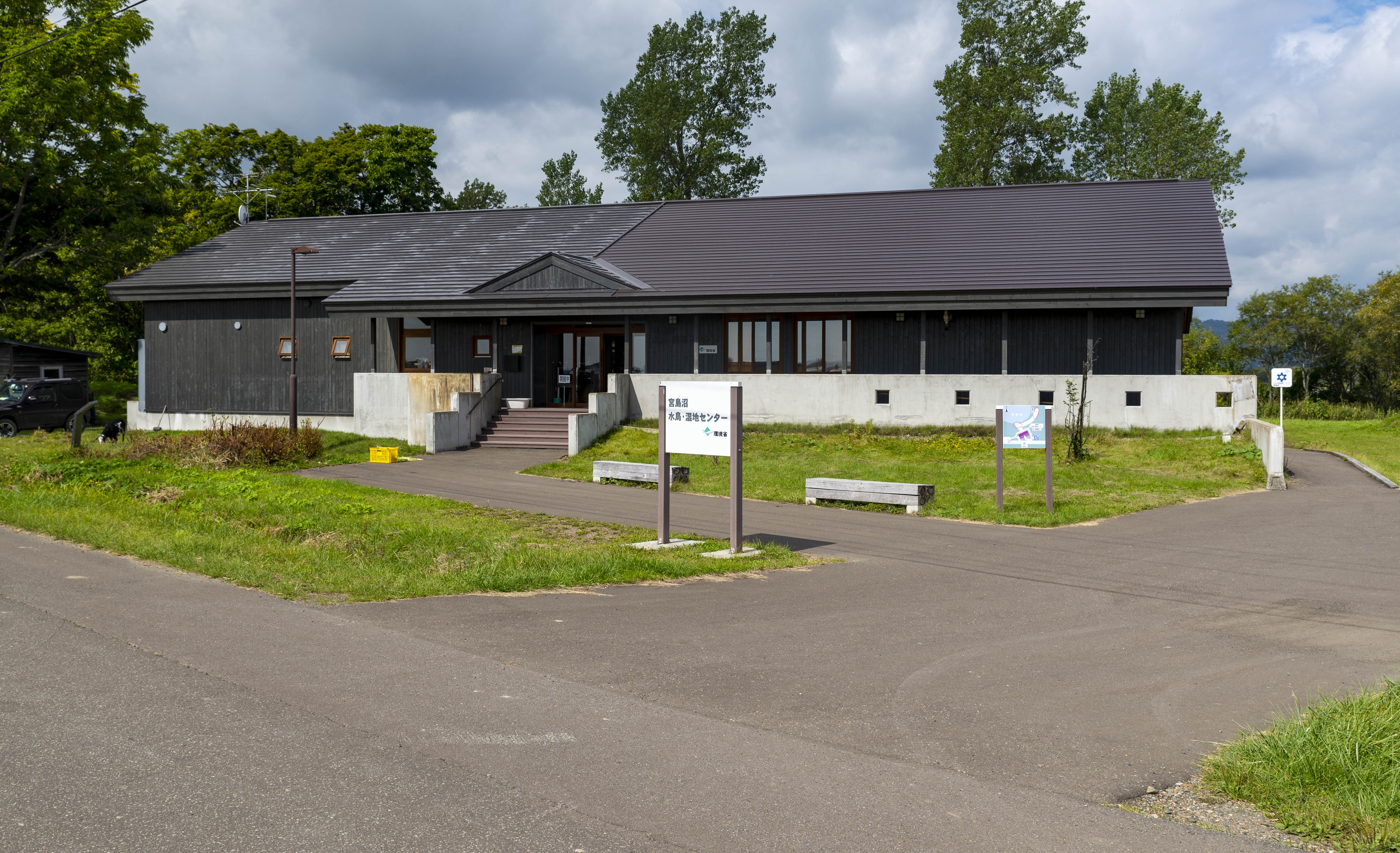 宮島沼水鳥・湿地センター